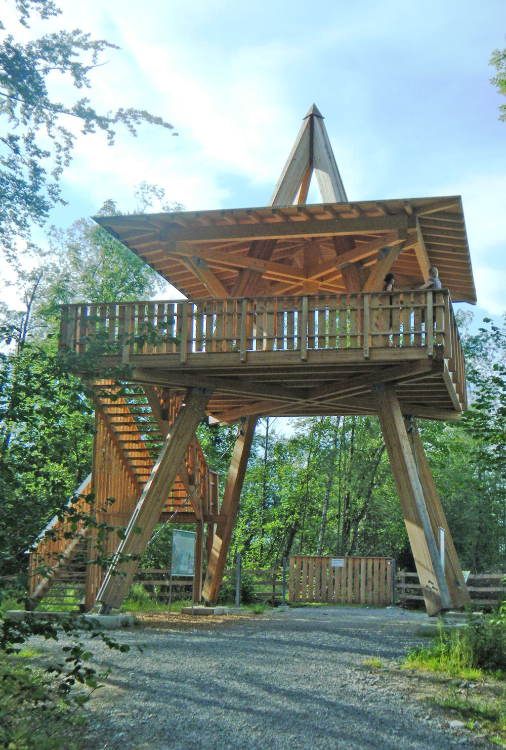 Holzturm in Lachen SZ, erbaut 2010, Koordinaten 707 210 / 228 860